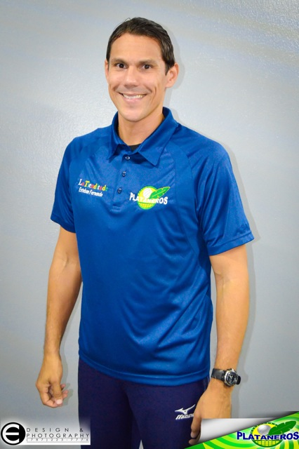 Dirigente de los Plataneros de Corozal desde la temporada 2012 y ex-jugador del Club por espacio de 10 temporadas.